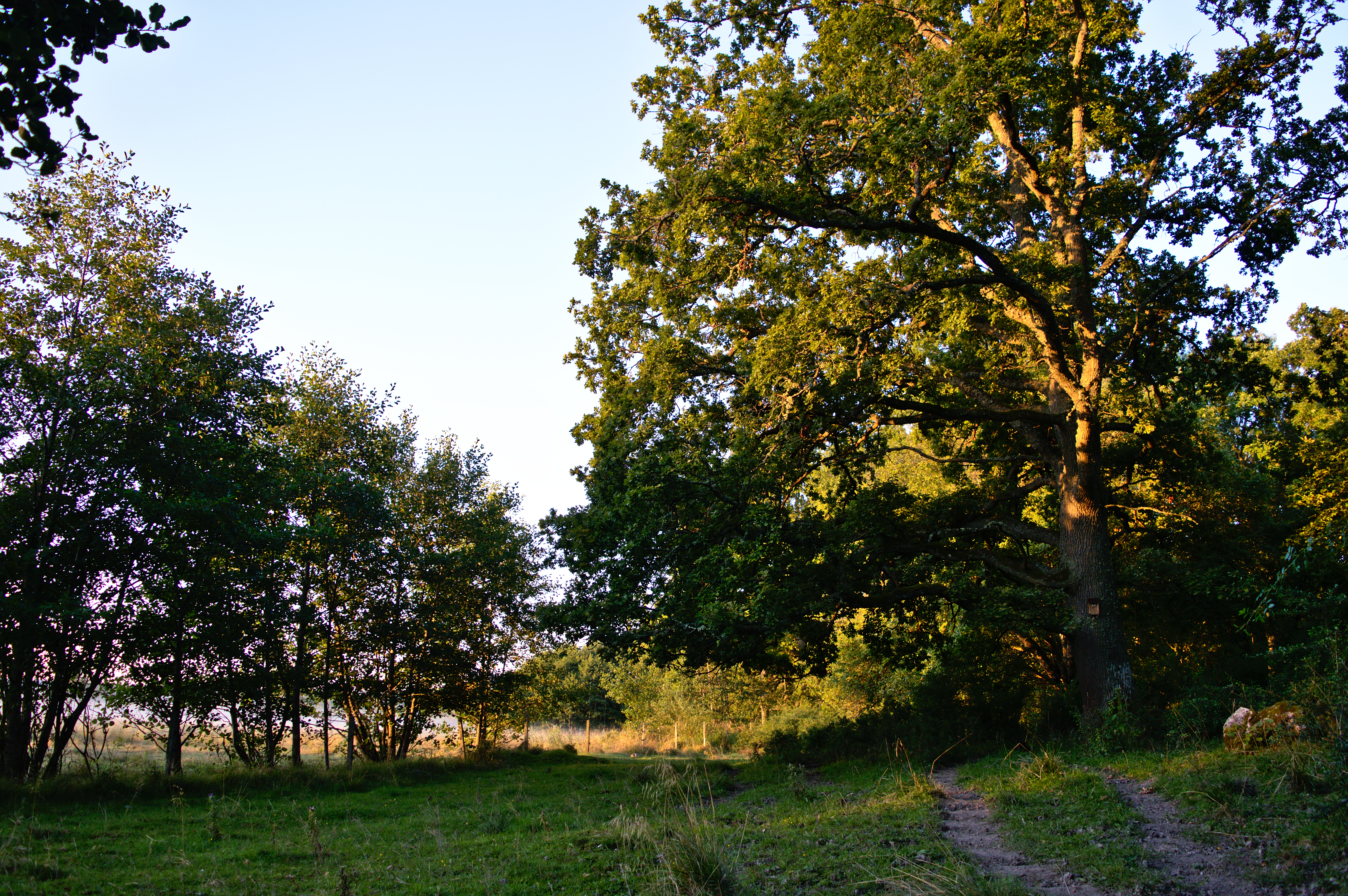 Naturreservatet Skäret i Eskilstuna kommun.